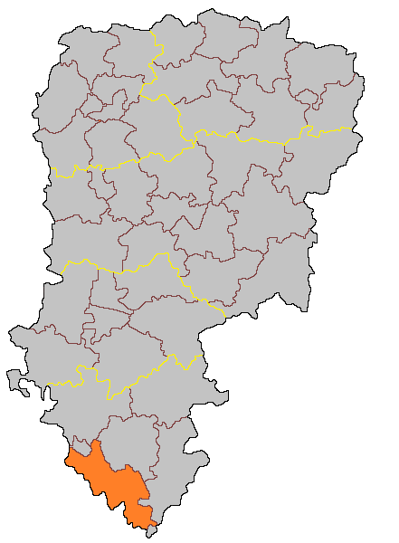 Кантон Шарли-сюр-Марн на карте департамента Эна